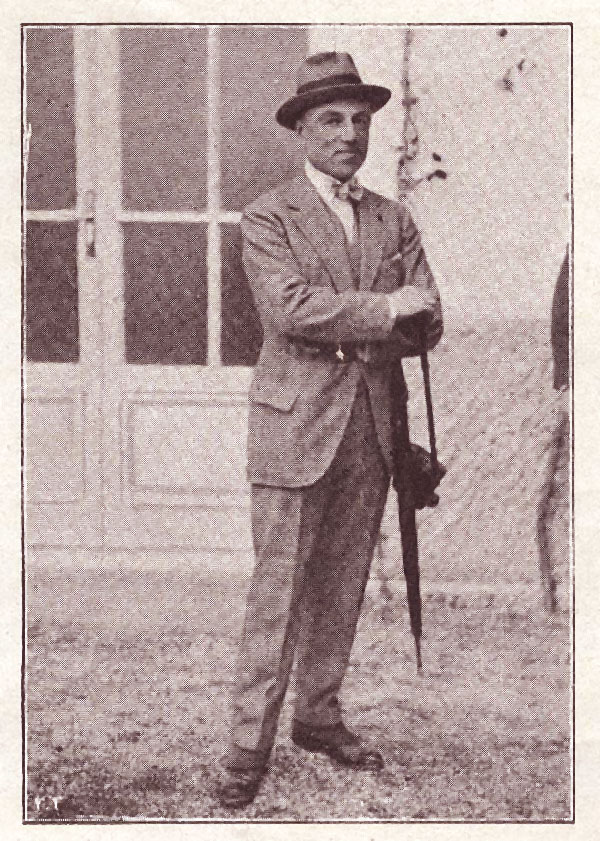 Federico Tesio nel 1921